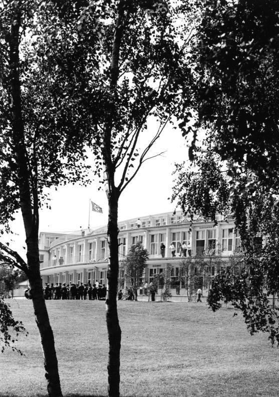 Berlin Olympiade 1936, Olympisches Dorf